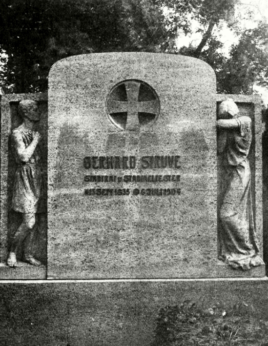 Grabplastik geschaffen 1905 von Ida Schaer-Krause (1877–1957) Bildhauerin für das Grab von Gerhard Struve (1835–1904), auf dem Alte St.-Matthäus-Kirchhof Berlin, (Matthäifriedhof). Architekt war Heinrich Schmieden, Regierungsbaumeister.